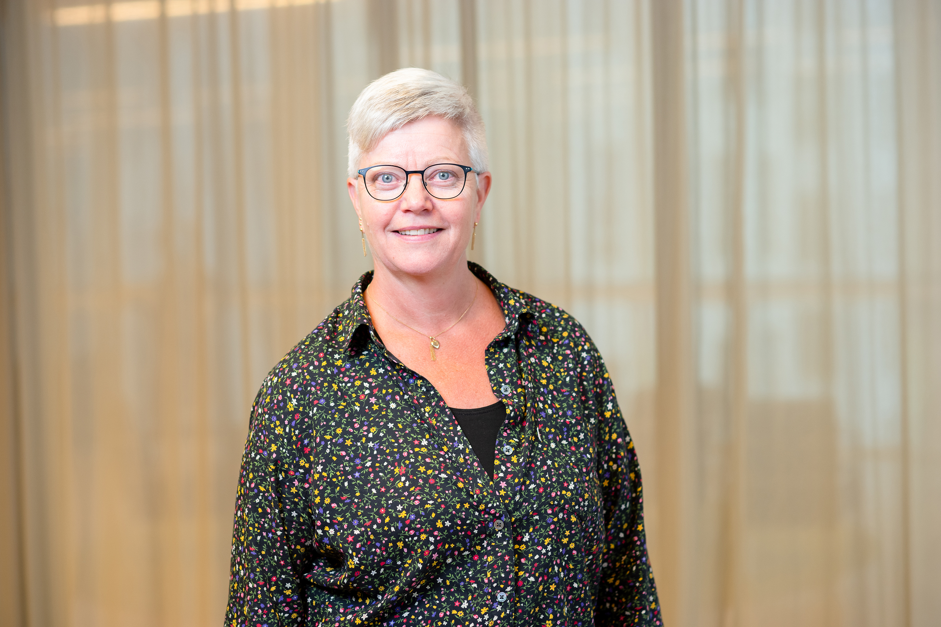 Annika Qarlsson, Centerpartiet